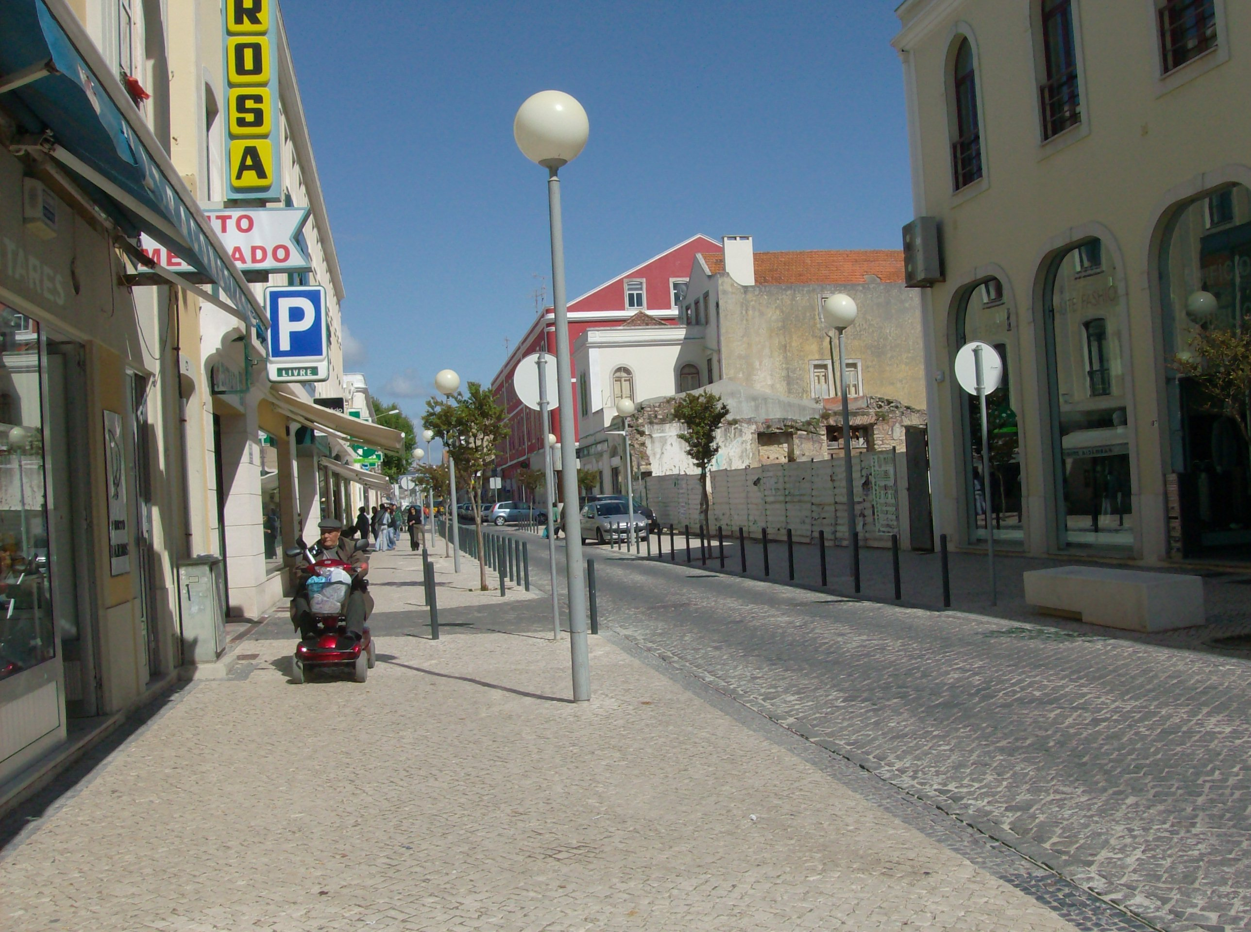 Uma fotográfia da Rua da República (Figueira da Foz)